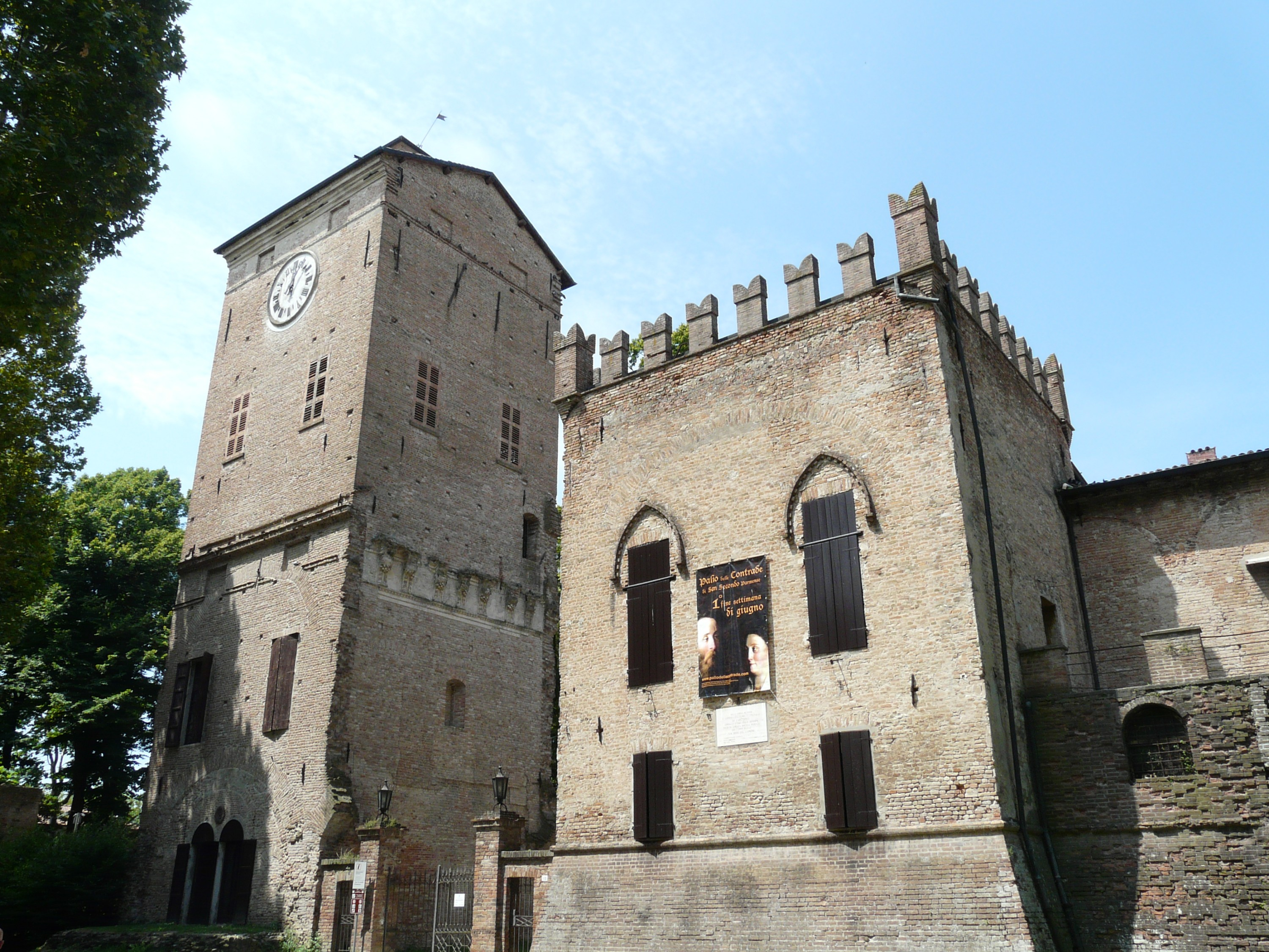 Rocca dei Rossi, San Secondo Parmense, Emilia-Romagna, Italia